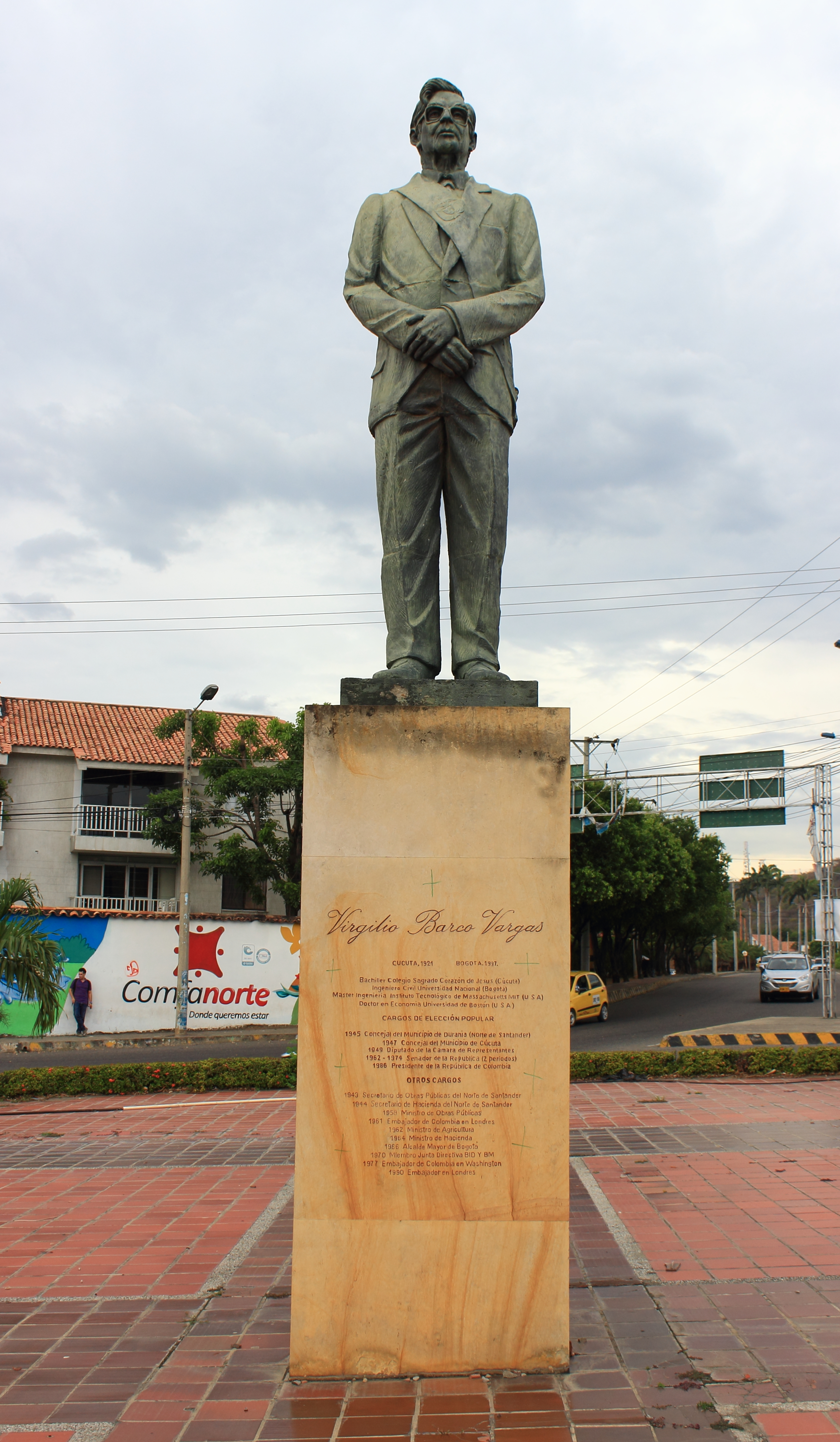 Estatua a Virgilio Barco Presidente de Colombia (1986-1990) ubicada en la redoma de Pinar de Rio